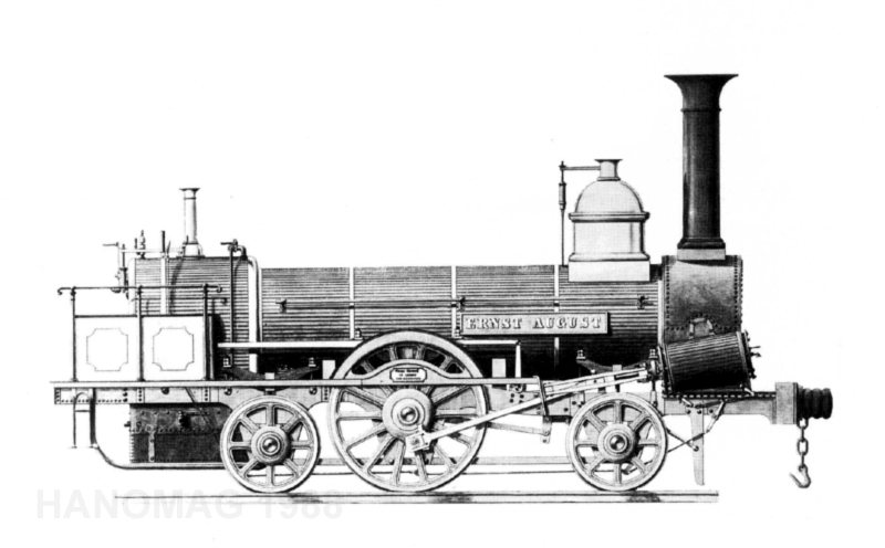 Duch den ersten Industriellen im Königreich Hannover, Georg Egestorff, wurde 1846 als fahrbare Dampfmaschine die erste Lokomotive ausgeliefert unter dem Namen des hannoverschen Regenten König Ernst August von Hannover. Die Lokomotive wurde noch im selben Jahr zur Eröffnung der Bahnstrecke von Hannover nach Hildesheim und unter dem Generalpostdirektor Wilhelm August von Rudloff zur Beförderung der Postgüter Hannovers eingesetzt ...